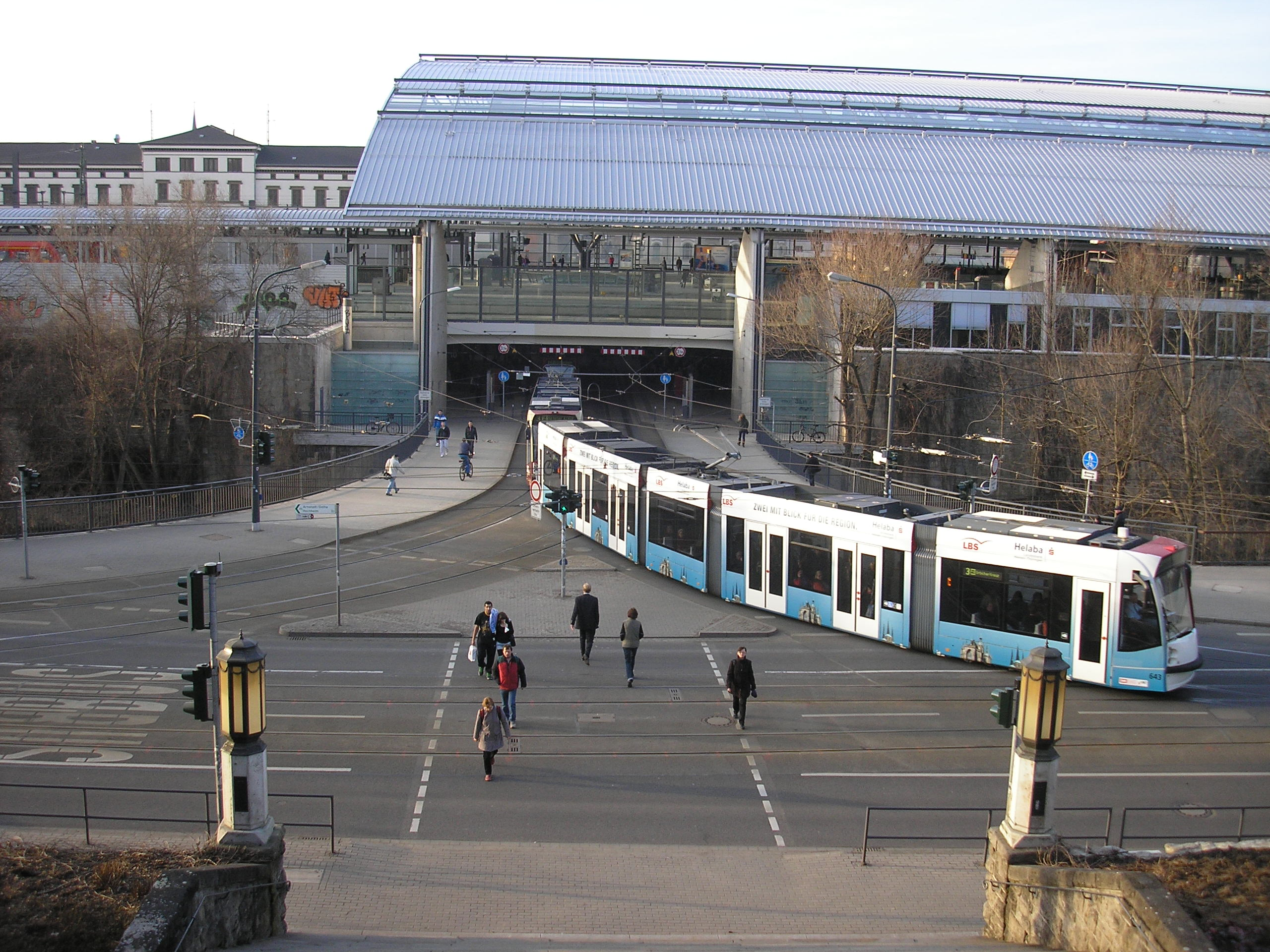 Eine Straßenbahn der Linie 3 bei Ausfahrt aus dem Erfurter Hauptbahnhof in Richtung Urbicher Kreuz.